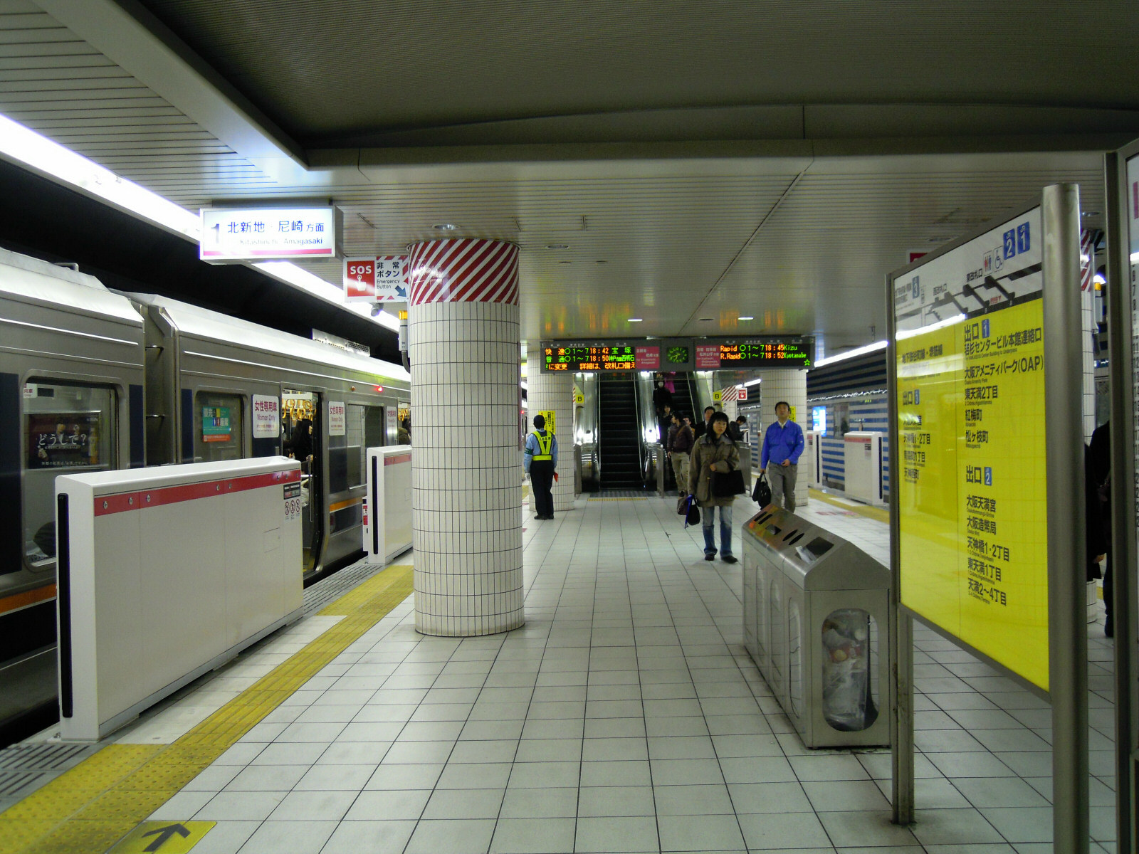 JR Osakatenmangu Station platform